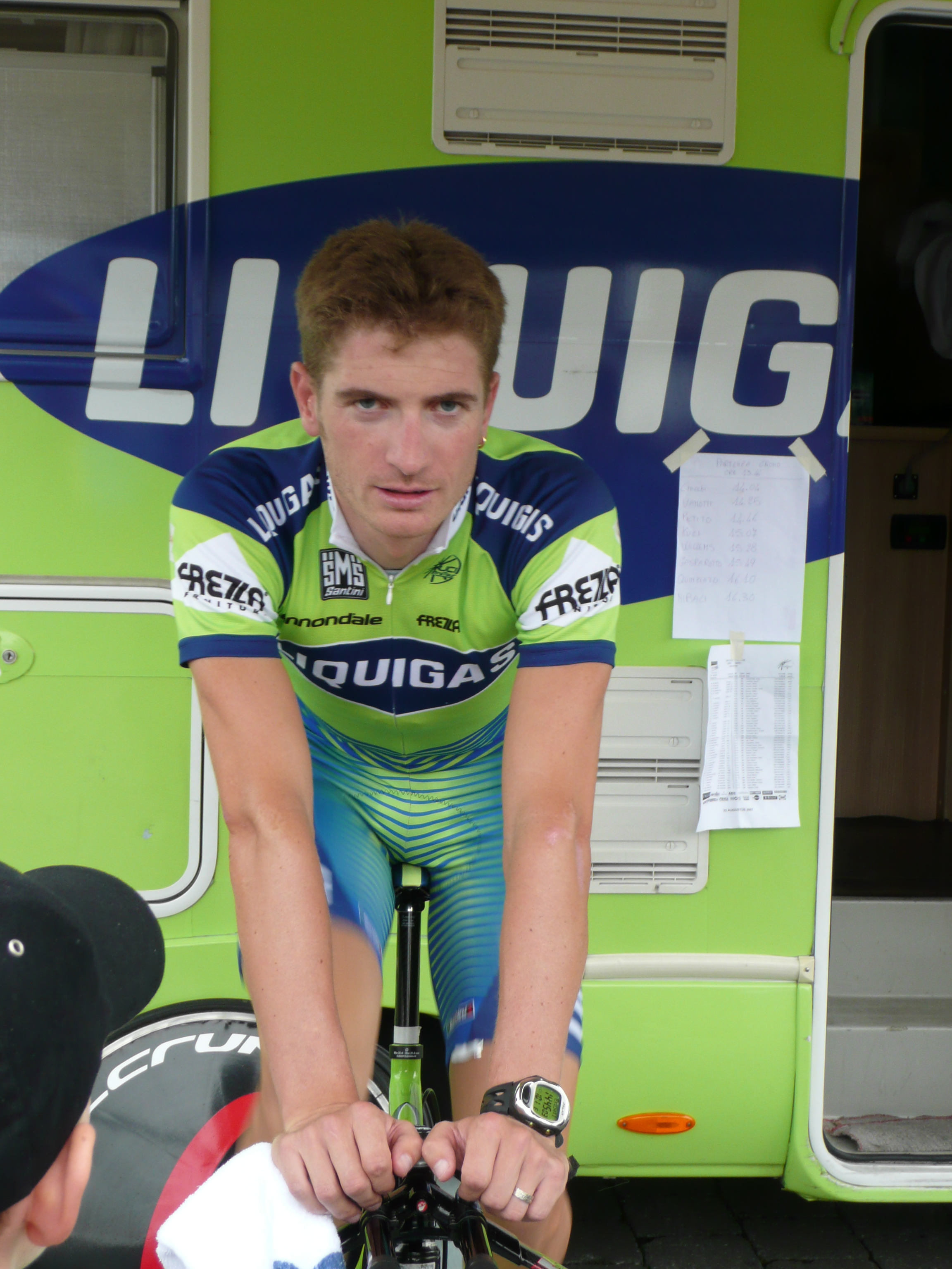 Frederik Willems tijdens de ENECO Tour 2007